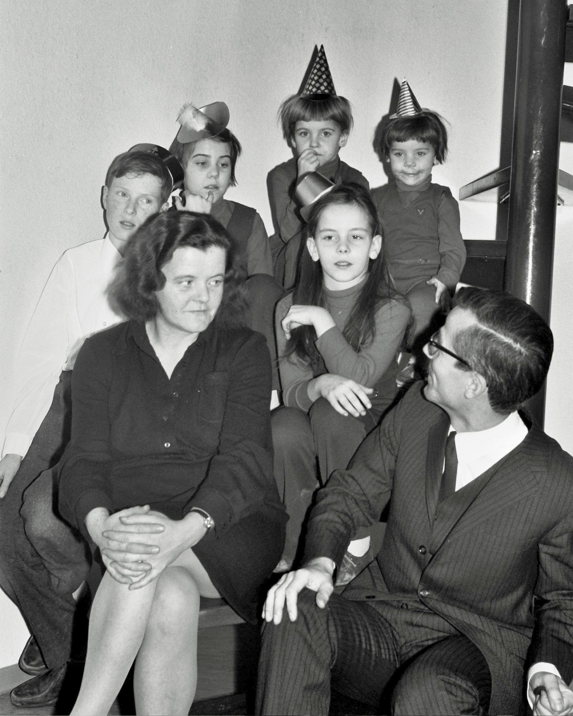 Familie von Juliane Hund im eigenen Haus (Allart, Juliane, Susanne, Isabel, Barbara, Dorothee und Gerhard)